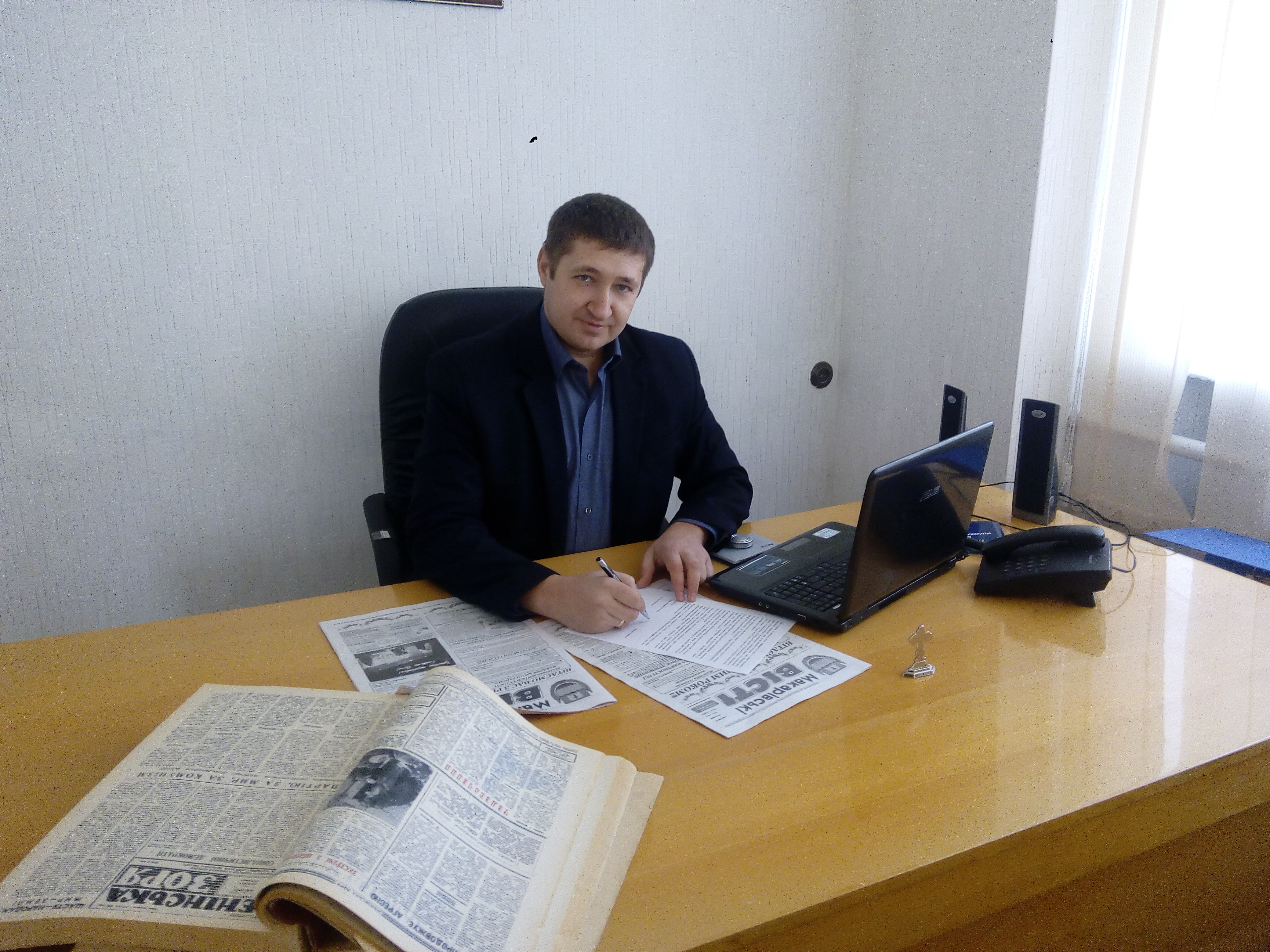 Головний редактор газети "Макарівські вісті" Максим Кравченя